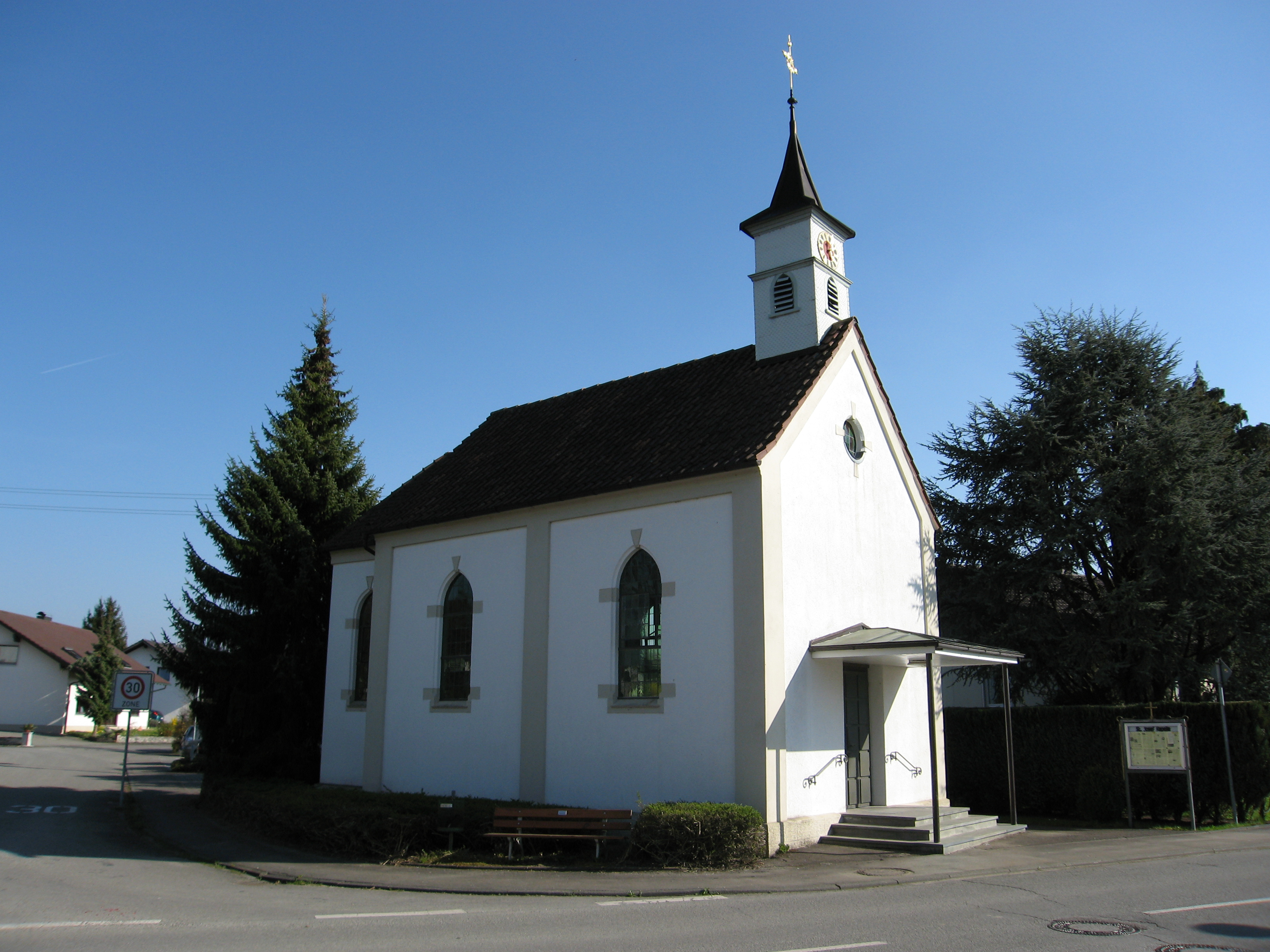 Die Kapelle St. Josef im Kau, Stadtteil von Tettnang